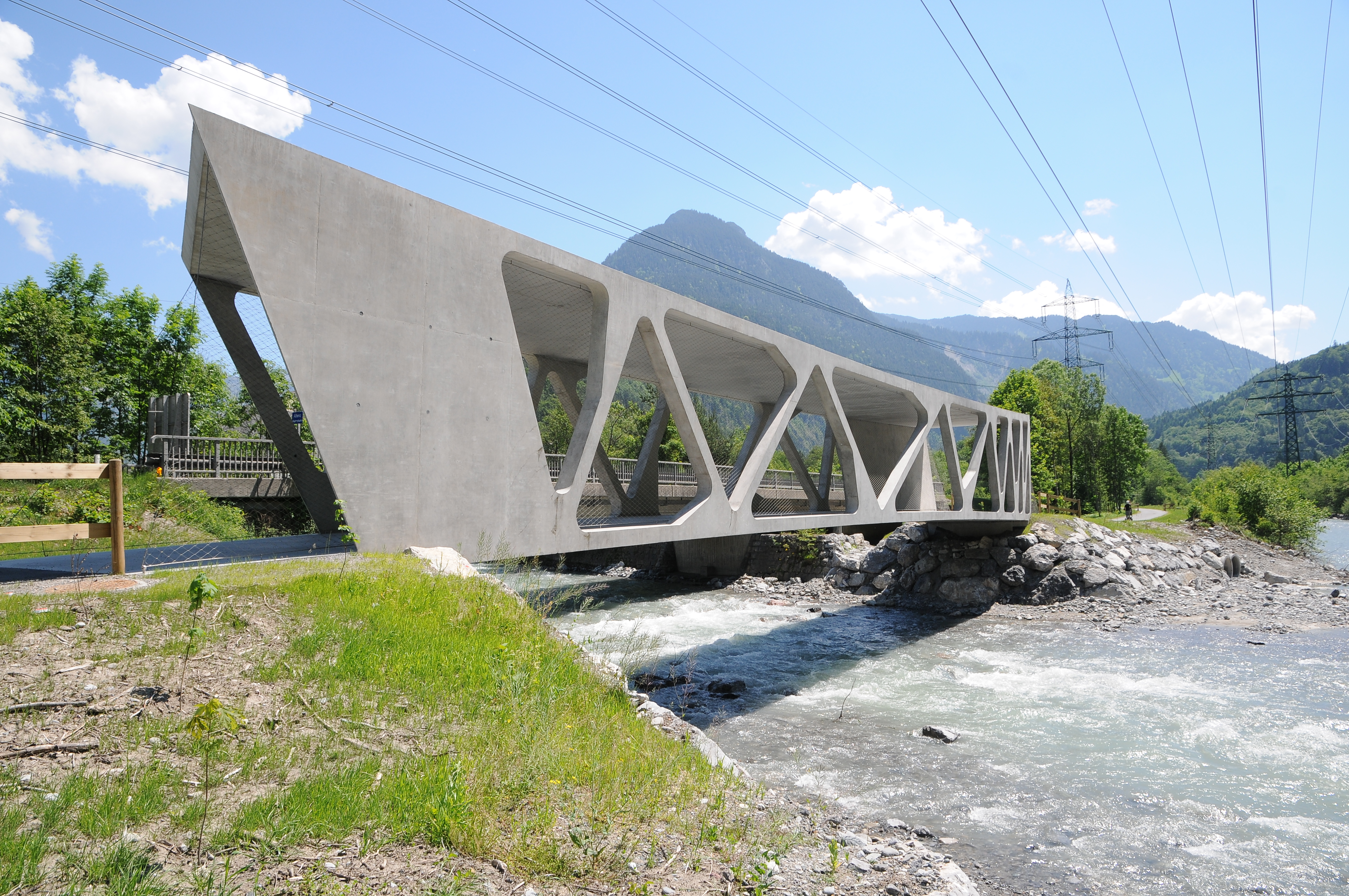 Fahrradbrücke über die Alfenz in Lorüns. 2010 erbaut nach Plänen vom Architekturbüro [1].